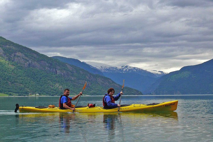 Одарич полюбляє байдарки